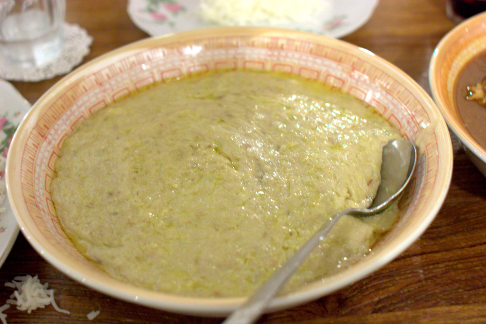 al fanar harees